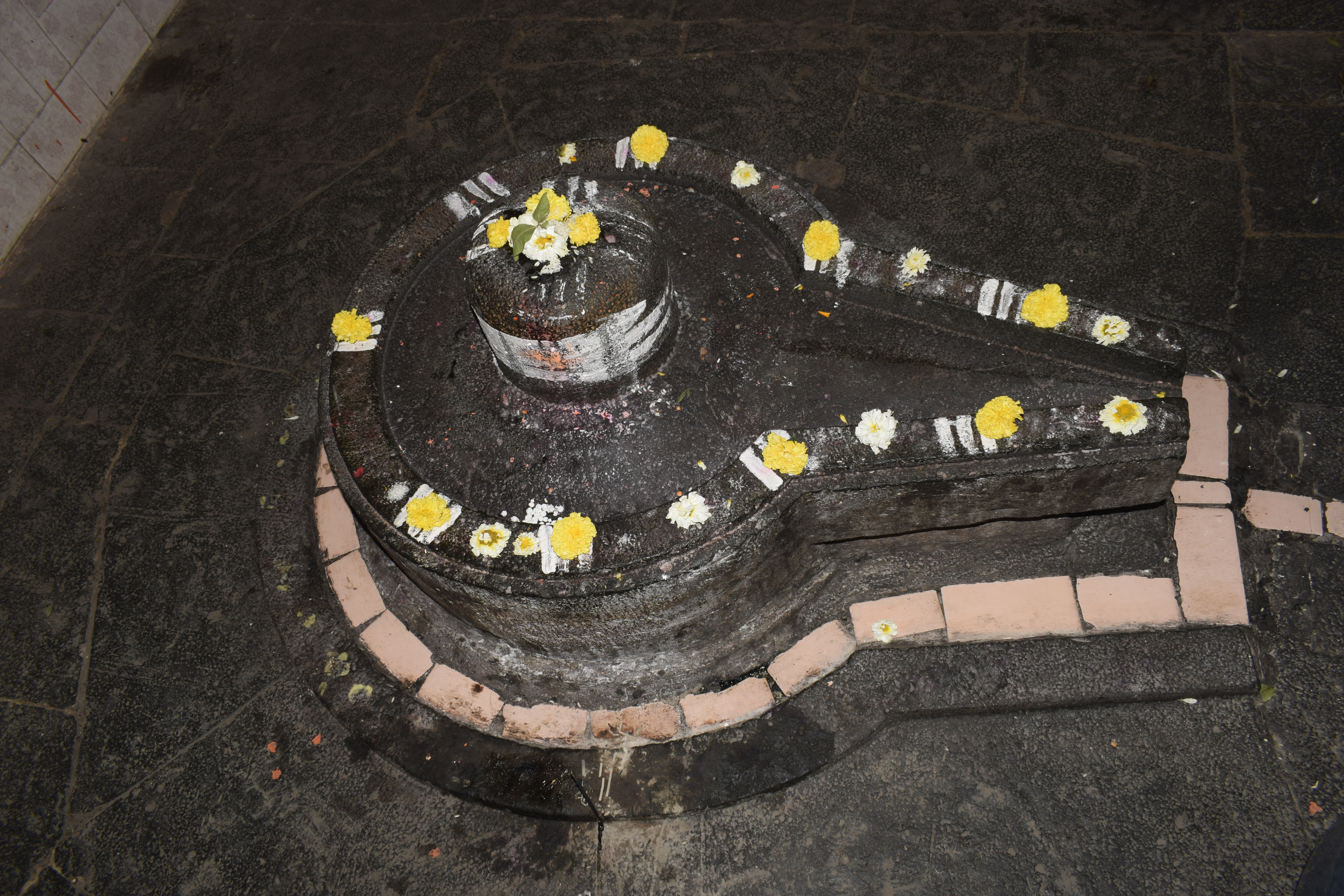 श्री त्रिपुरांतकेश्वर लिंग